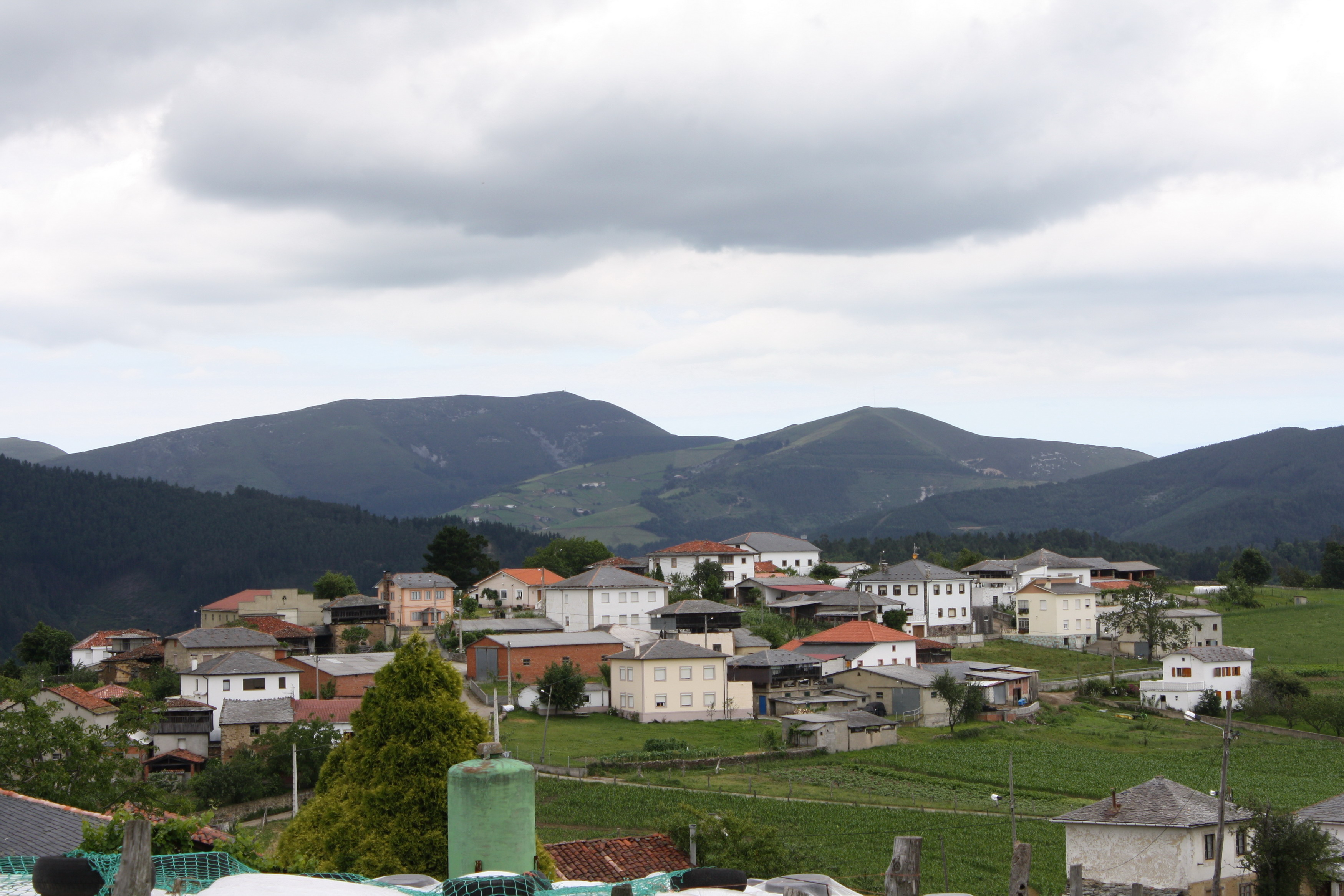 Visión de miño.